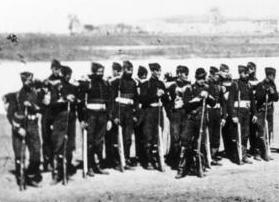 French troop, Metz, Aug, 1870.